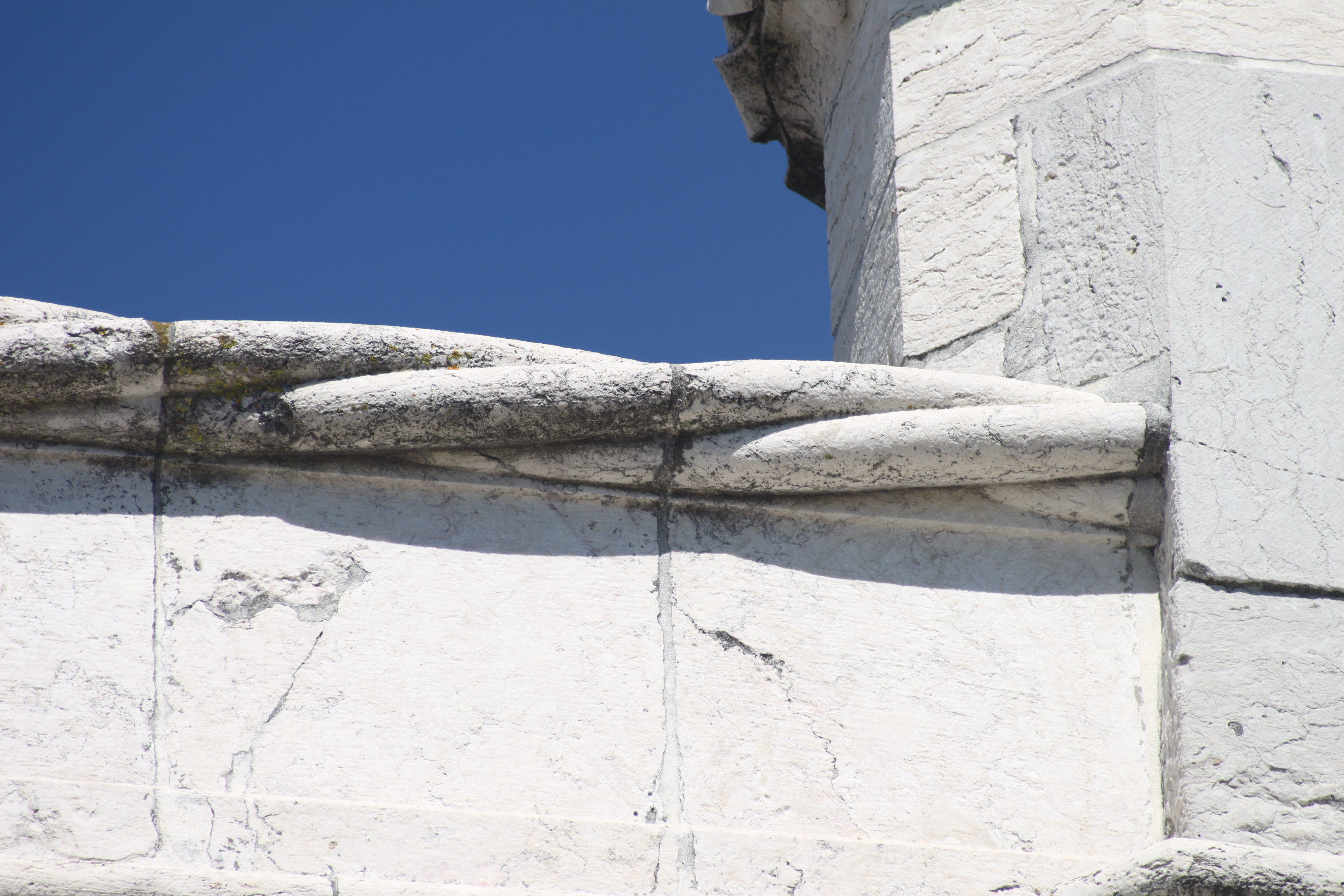 Capela de São Jerónimo ou Ermida de São Jerónimo ou Ermida do Restelo This file was uploaded for Wiki Loves Monuments in Portugal with the unique identifier 70633.